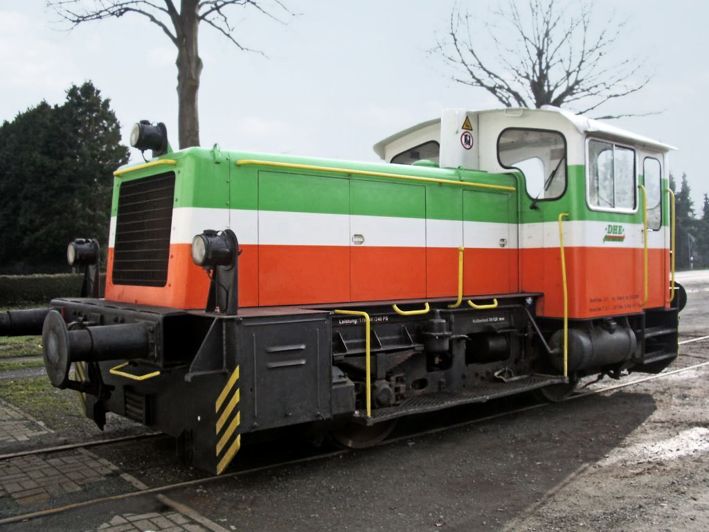 Lok 10 der Delmenhorst-Harpstedter Eisenbahn, vorm Lokschuppen in Harpstedt